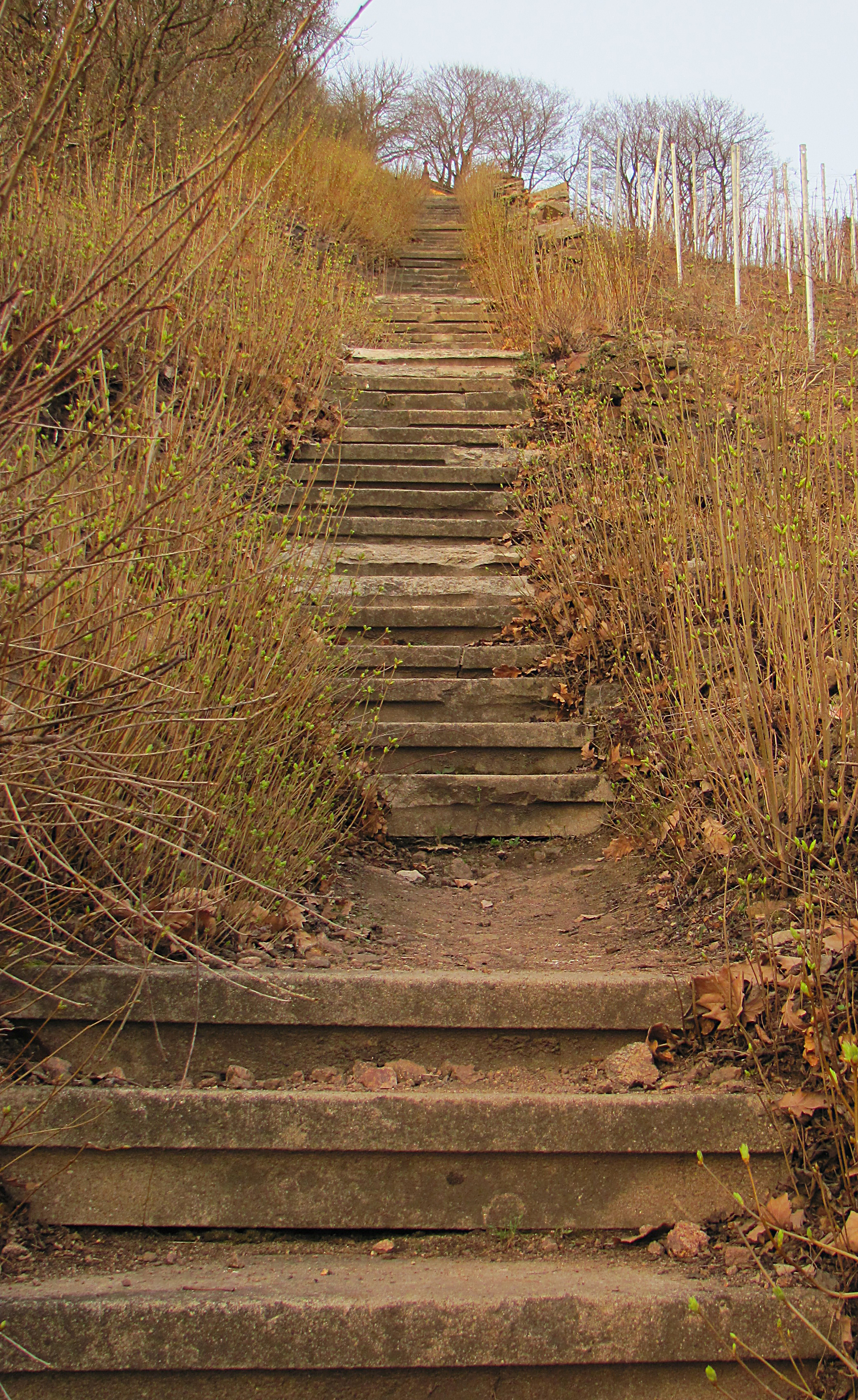 Radebeul, Haus Wettinshöhe, Weinbergstreppe, das Oberteil des Tors im Hintergrund